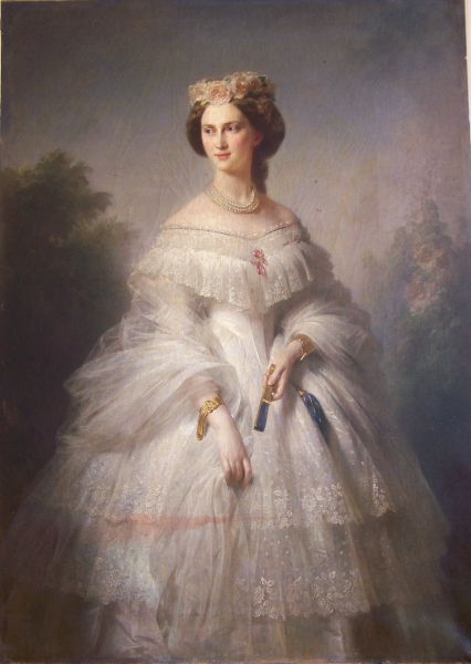 Das Ölbild zeigt ein Porträt der russischen Großfürstin Alexandra von Rußland, geb. Prinz. Charlotte von Preußen (1798 - 1860), Gattin des russischen Zarin Nikolaus I. Sie trägt ein weißes Kleid und einen Rosenkranz auf ihren Kopf. In der Hand hält Alexandra eine zusammengeklappten Fächer. Links von ihr ist ein Rosenstock dargestellt.